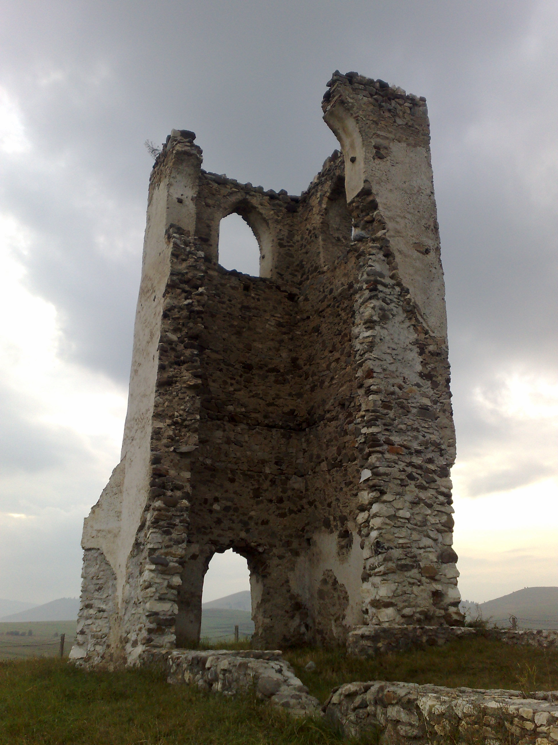 Ruinele turnului bisericii medievale "Csonkatorony" de la Tomeşti, judeţul Harghita.